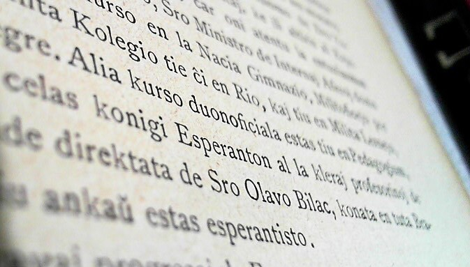 La numero 2 (majo 1907) de la "Brazila Revuo Esperantista", la unua E-revuo redaktita en Brazilo, citas la brazilan poeton Olavo Bilac (1865-1918): "Alia kurso duonoficiala estas tiu en [la lernejo] Pedagogium, kiu speciale celas konigi Esperanton al la kleraj profesorinoj de tiu domo, inde direktata de Sro Olavo Bilac, konata en tuta Brazilujo, kaj kiu ankaŭ estas esperantisto."